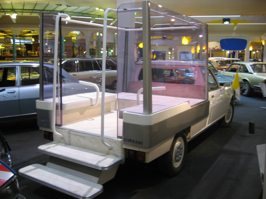 Peugeot 504 Pick-up - Papamobile du Pape Jean Paul II - Musée Peugeot Sochaux